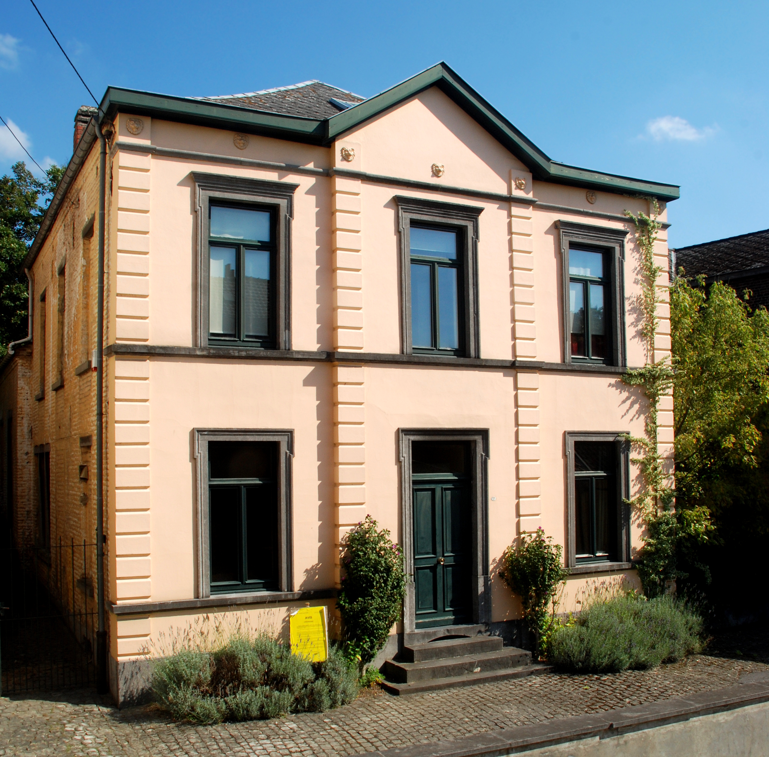 Belgique - Brabant wallon - Court-Saint-Étienne - Rue du Village n°17